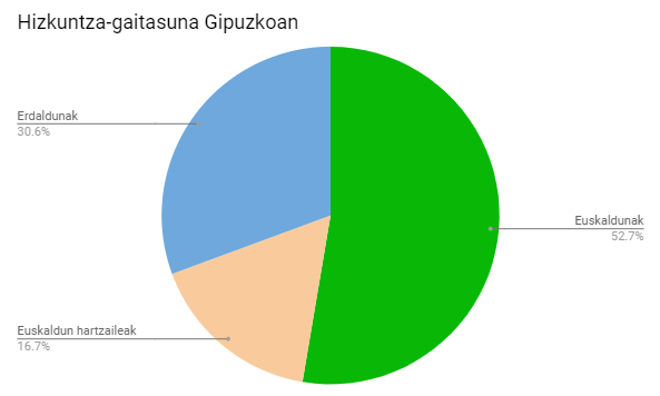 Gipuzkoako hizkuntza-gaitasuna, 2011ko ikerketa soziolinguistikoaren arabera.